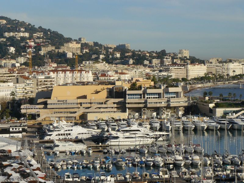 Palais des Festivals et des Congrès de Cannes, vu de la tour de la Castre